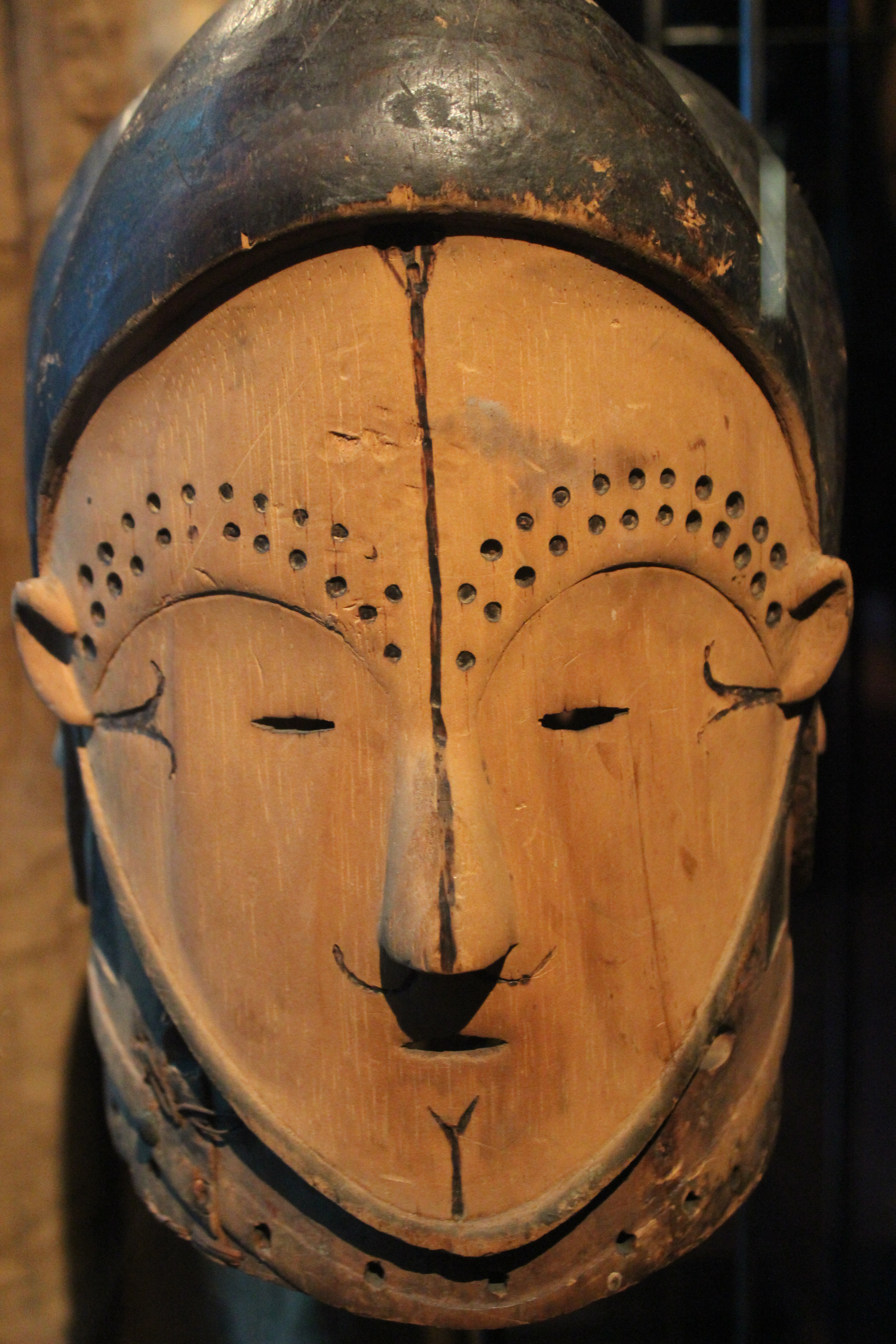 París. Musée du Quai Branly. Máscara cuádruple Fang-Beti.